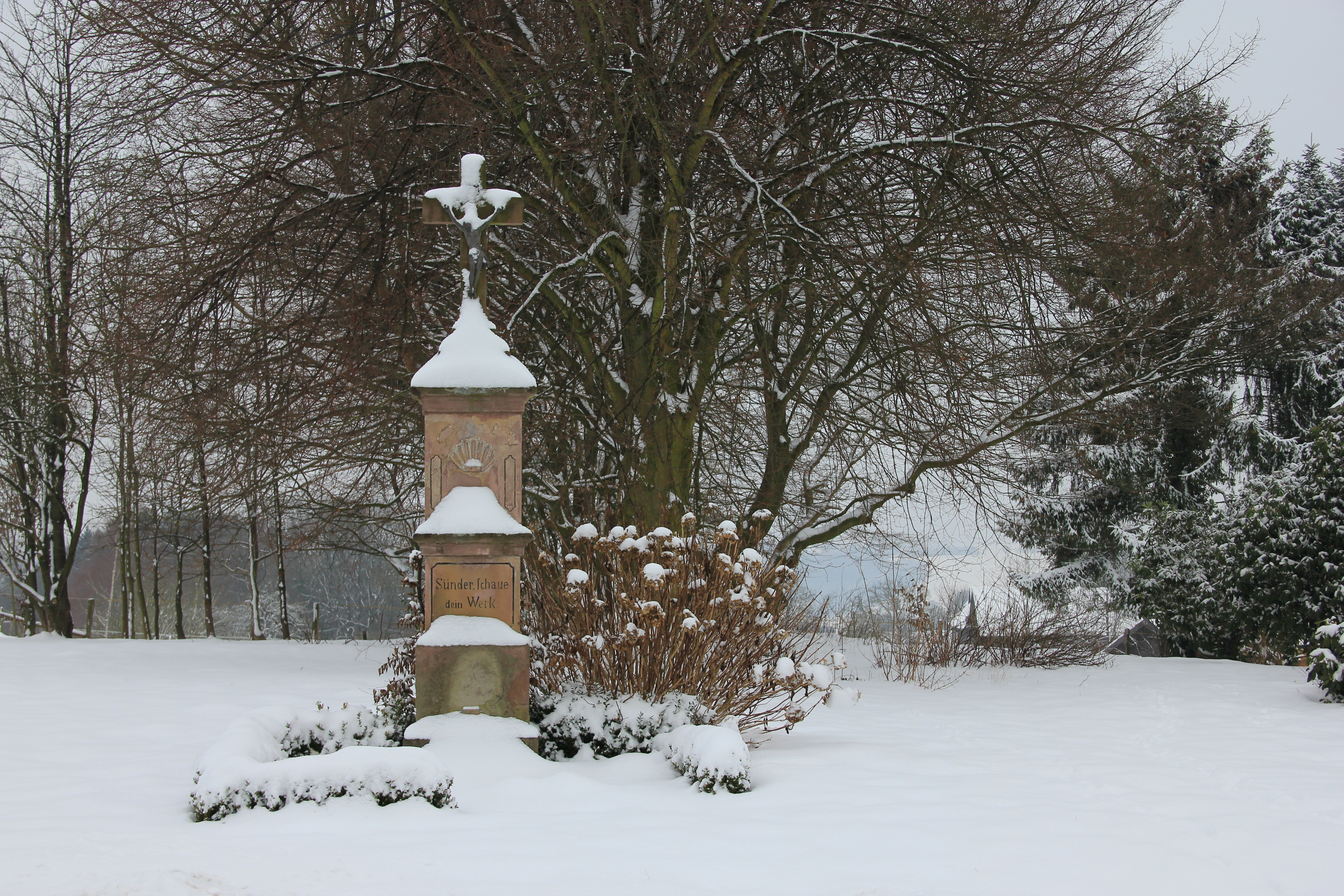 Wegekreuz in Lohmar - Weeg am 21. Januar 2013